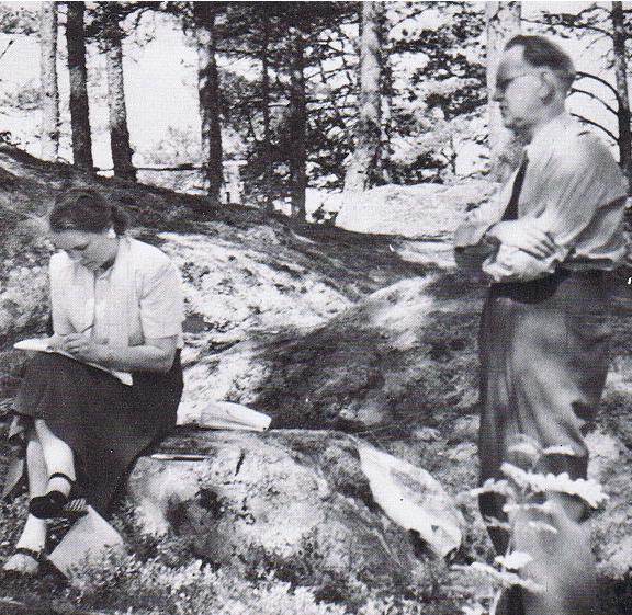 Tage Erlander dikterar i en skogbacke på Bommersvik 1948 för sin sekriterare Maria Nyström.